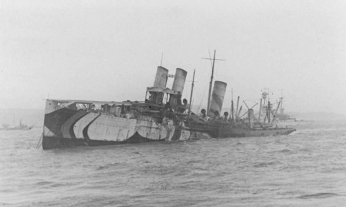 HMS Campania sinking